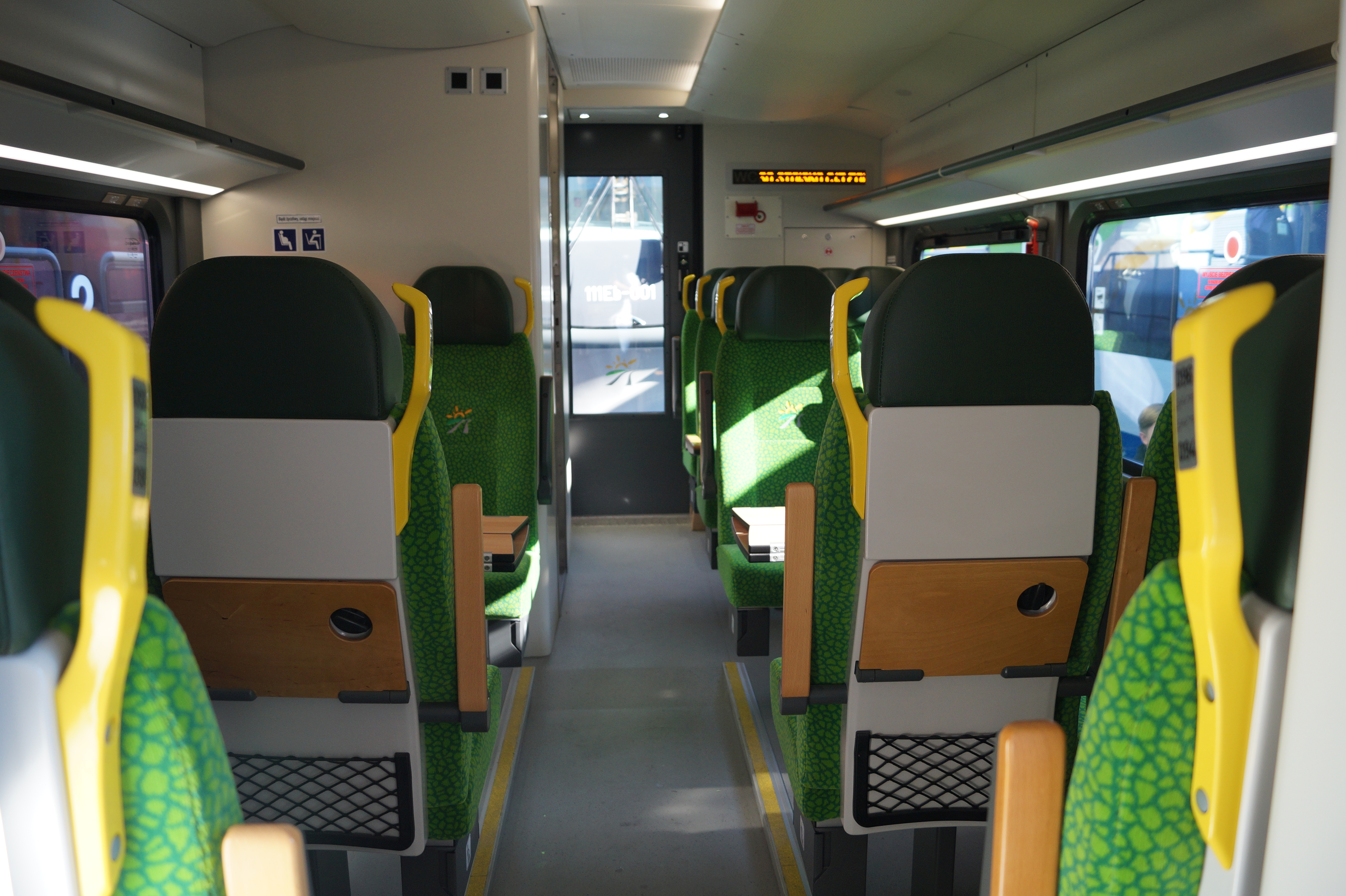 The making of this document was supported by Wikimedia Polska Association, within Wikigrant no. WG 2015-34. English | polski | +/− Dolny pokład wagonu typu 416B (Pesa Sundeck) w barwach Kolei Mazowieckich wystawianego na Targach Trako 2015